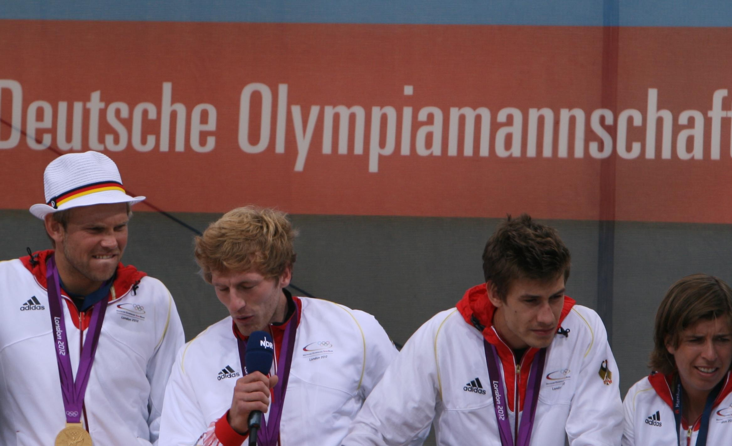 Empfang der Olympioniken 2012 in Hamburg